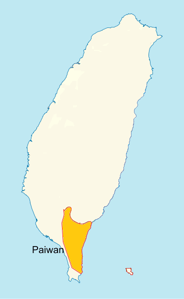 Karta över utbredningen av folket Paiwan på ön Taiwan. Skapad utifrån en karta av Wikimedia Commons-användaren Jappalang. Ursprunglig karta